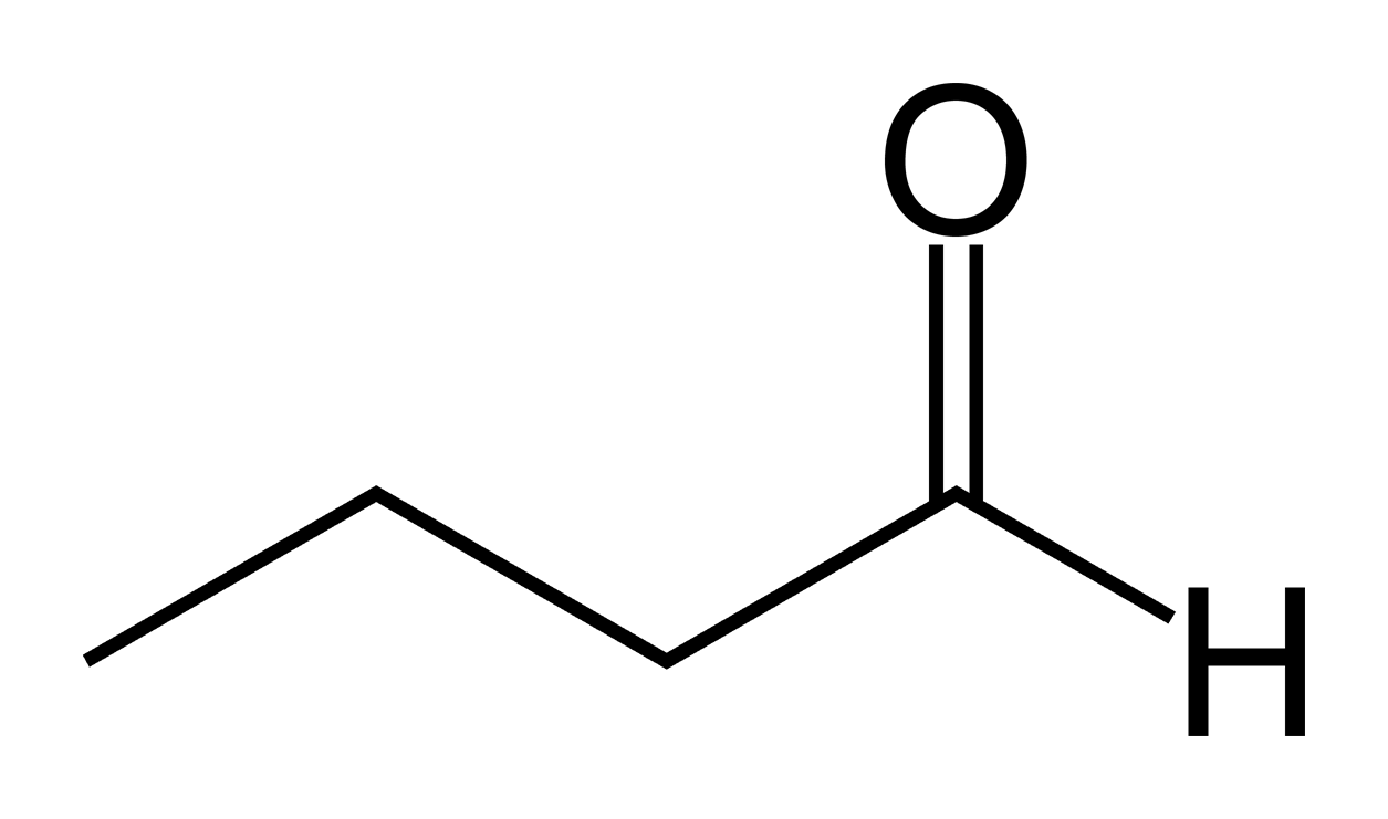 Butanal-skeletal